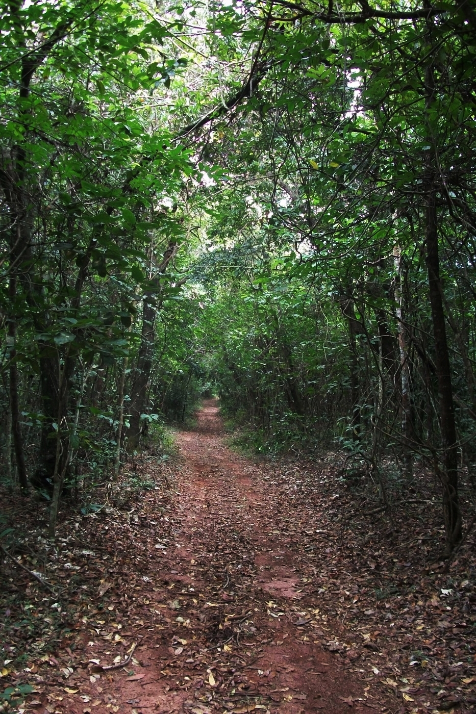 Estradas para caminhada dentro do parque - Parque Estadual Matas do Segredo, Campo Grande-MS